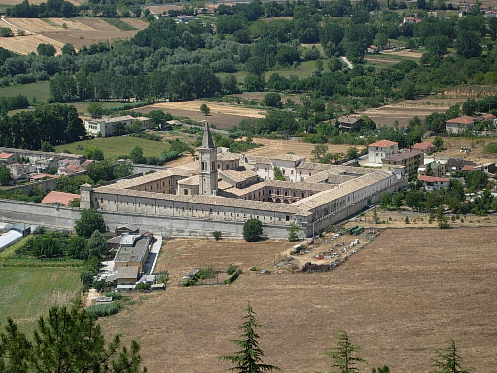 Badia Morronese, Sulmona (AQ) Foto personale concessa in PD